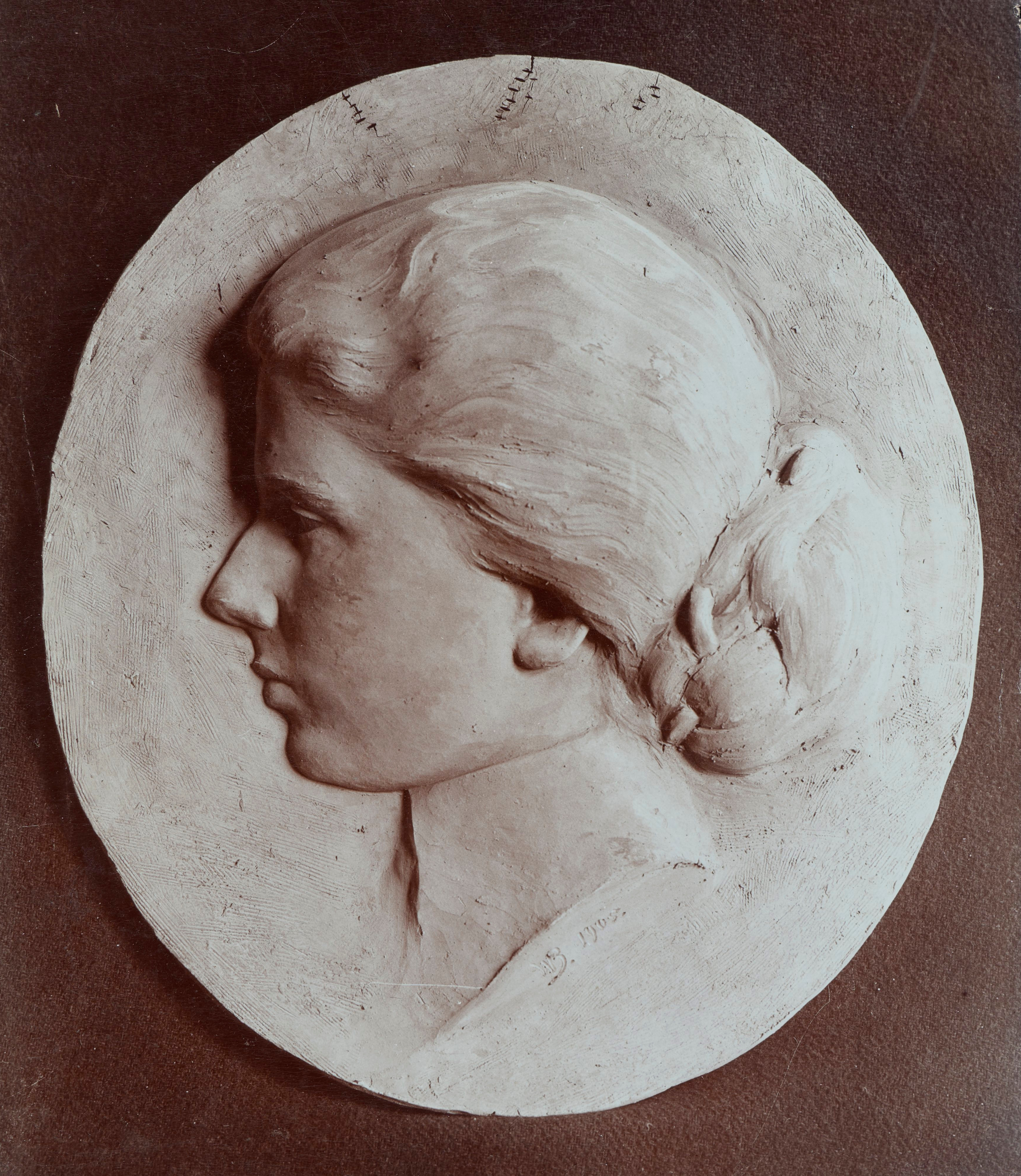 Głowa dziewczyny, rzeźba Wojciecha Brzegi